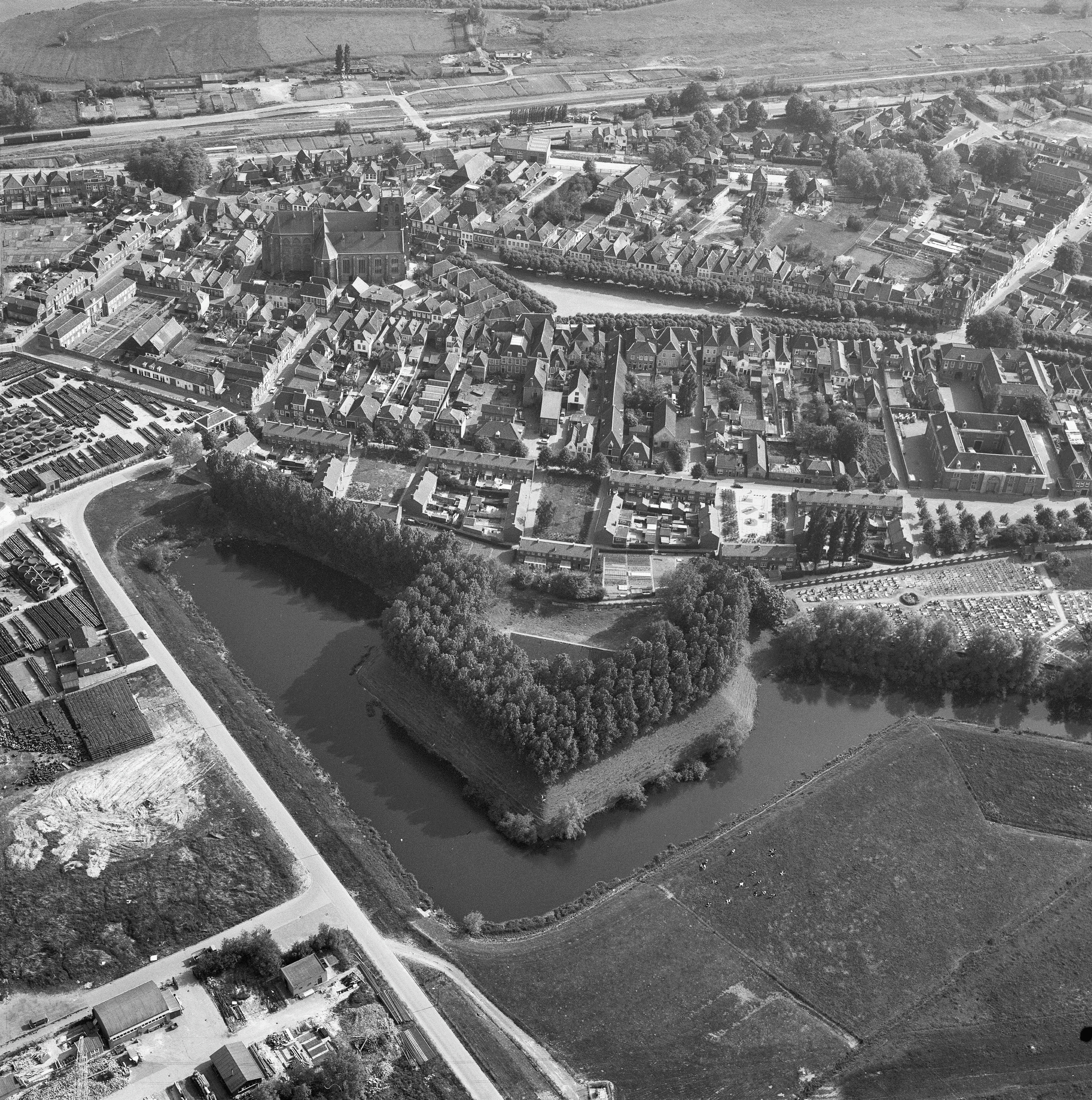 Plattegronden En Overzichten: luchtfoto's